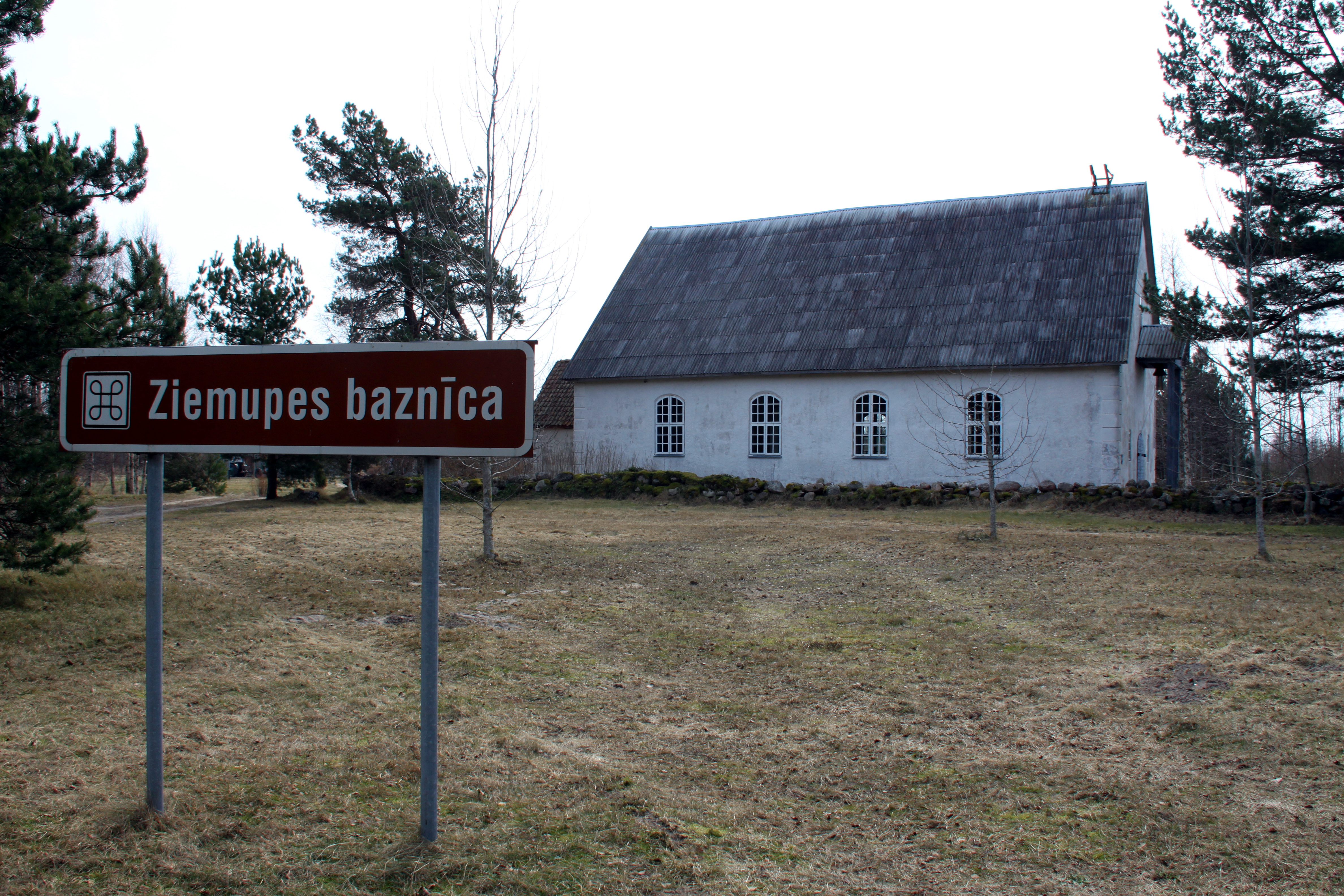 Ziemupe